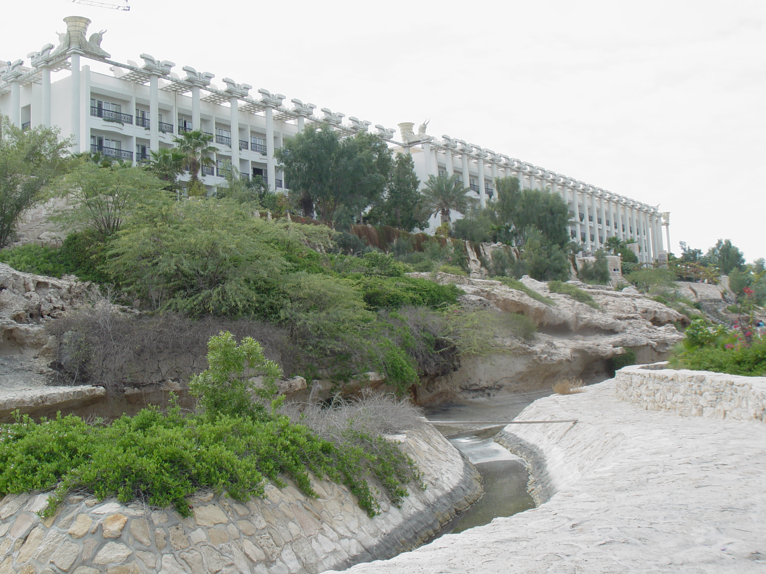 نمای پشتی هتل داریوش کیش